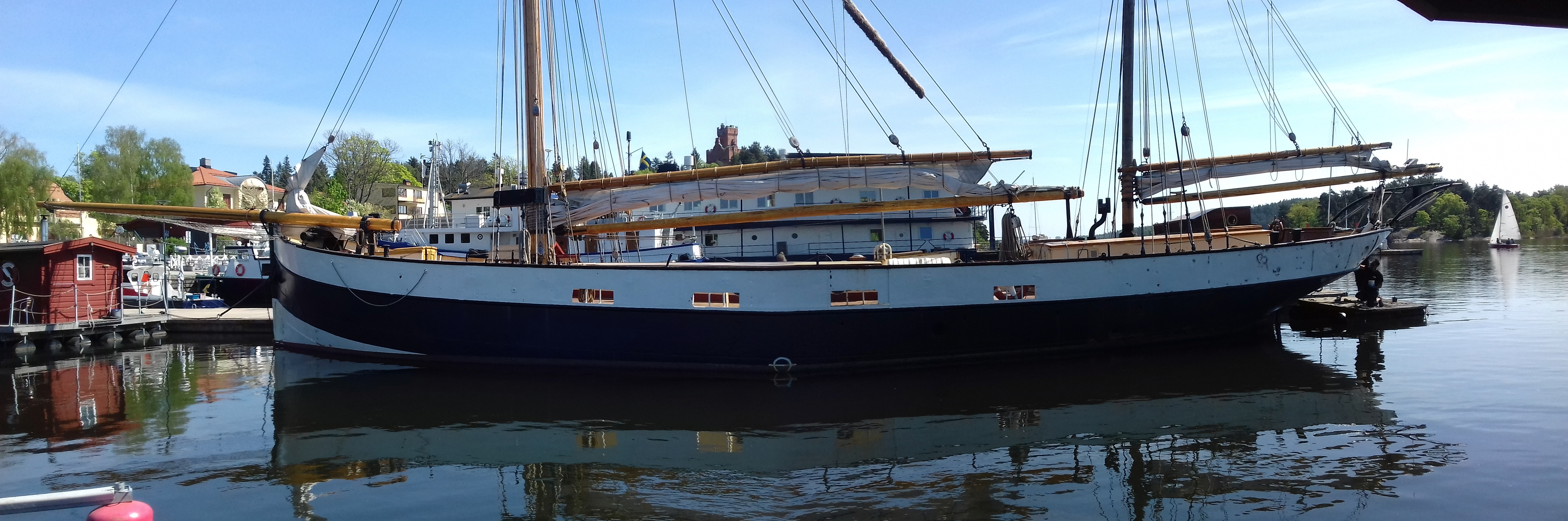 Marina gymnasiets skolfartyg, byggd 1915